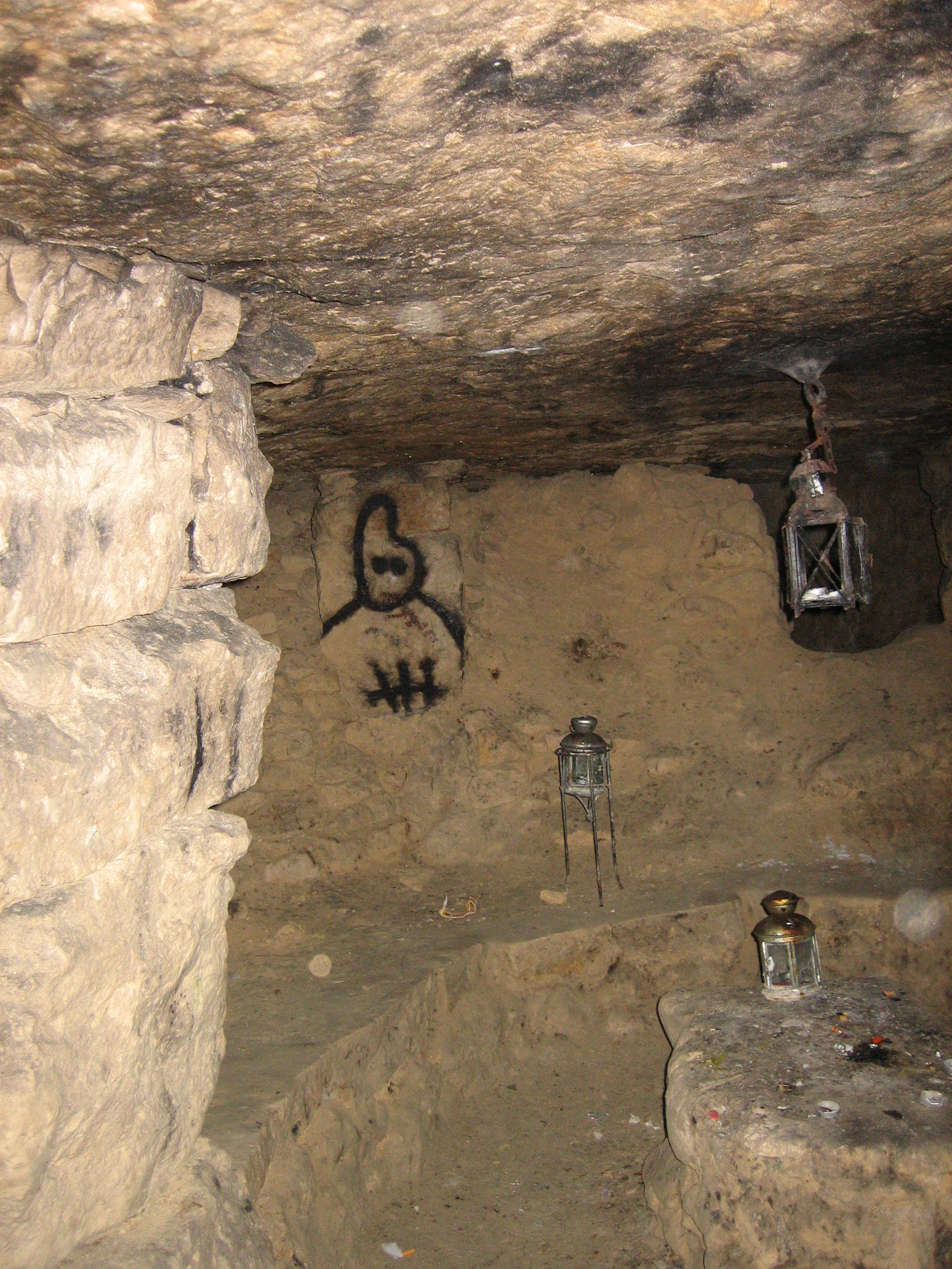 Promenade dans les catacombes de Paris, près du Charlety